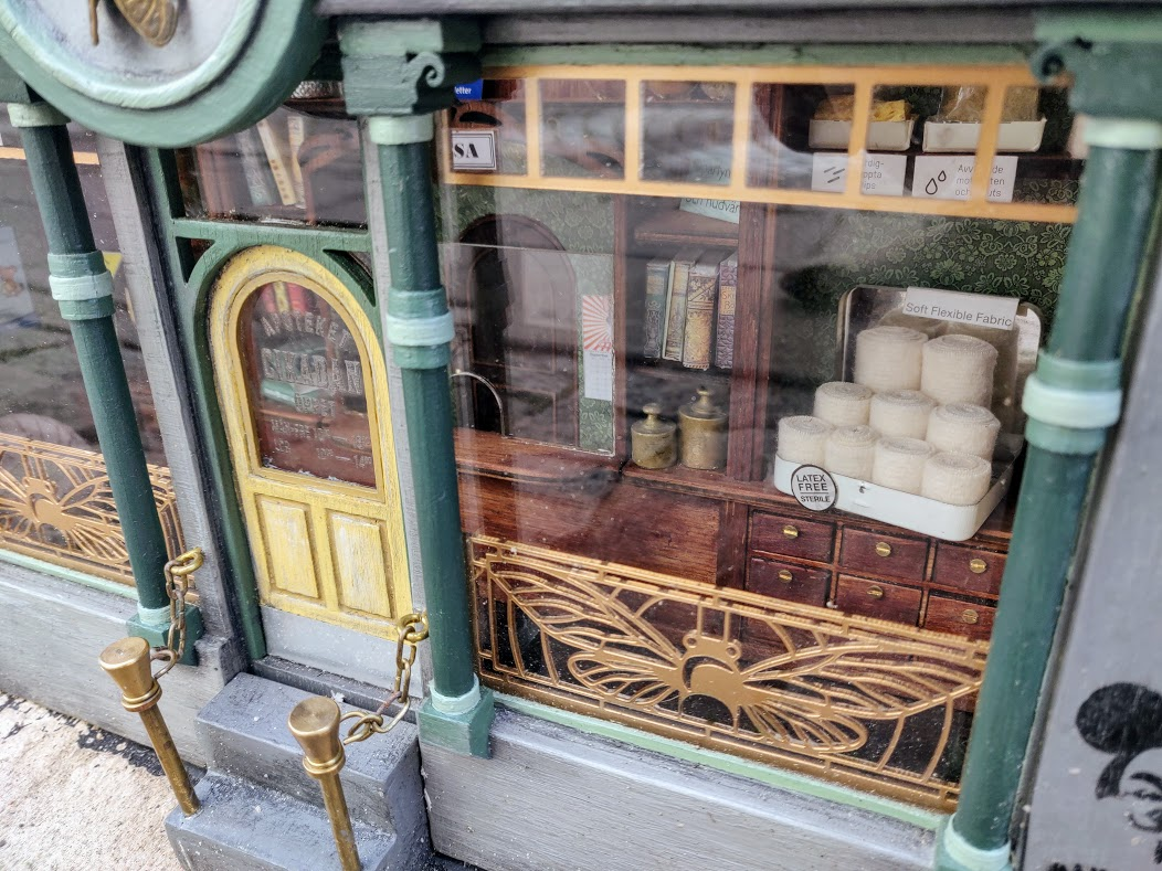 Detalj av Apoteket Cikadan, installation av AnonyMouse i Lund 2020